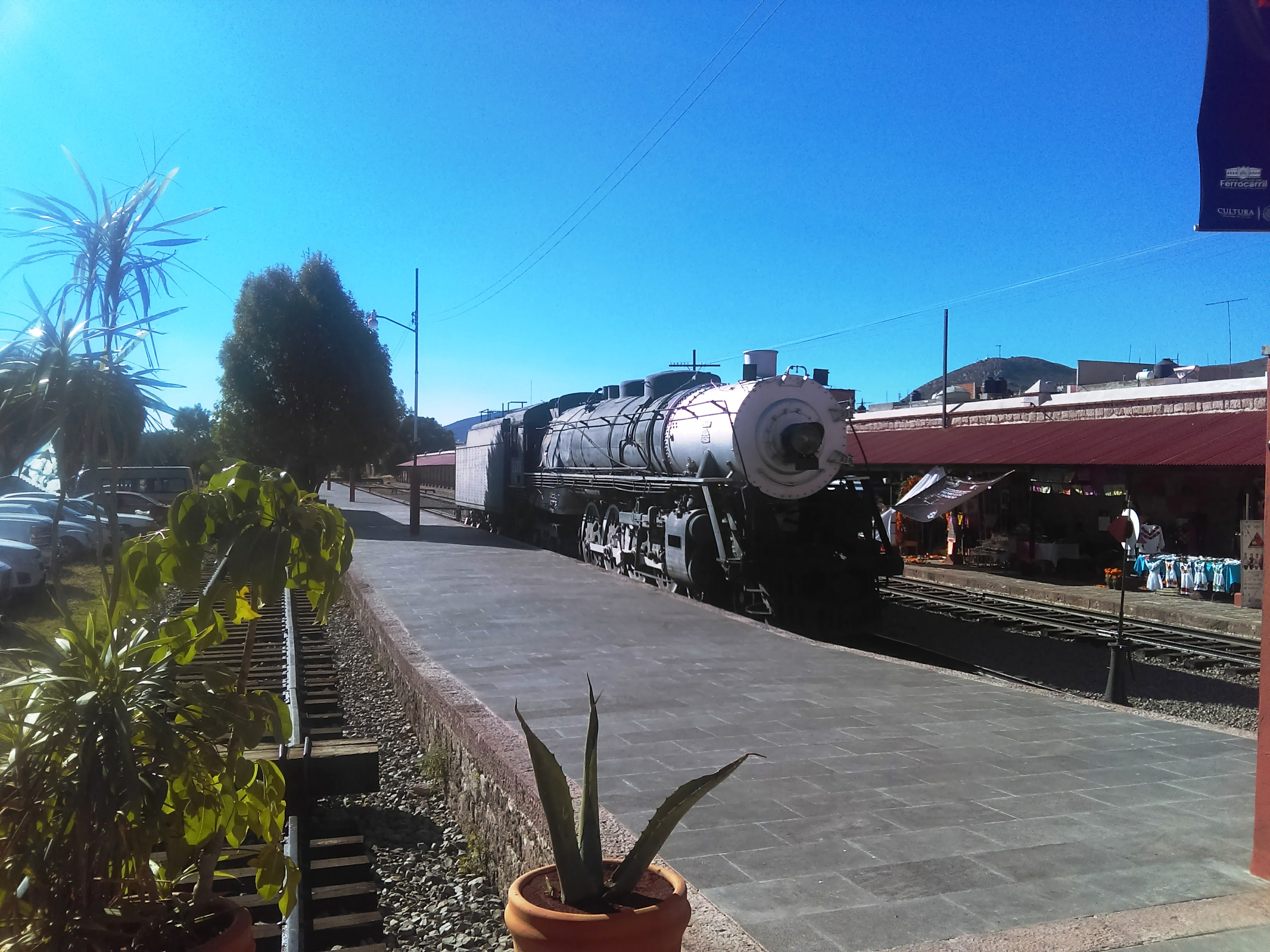 Centro Cultural del Ferrocarril en Pachuca, México